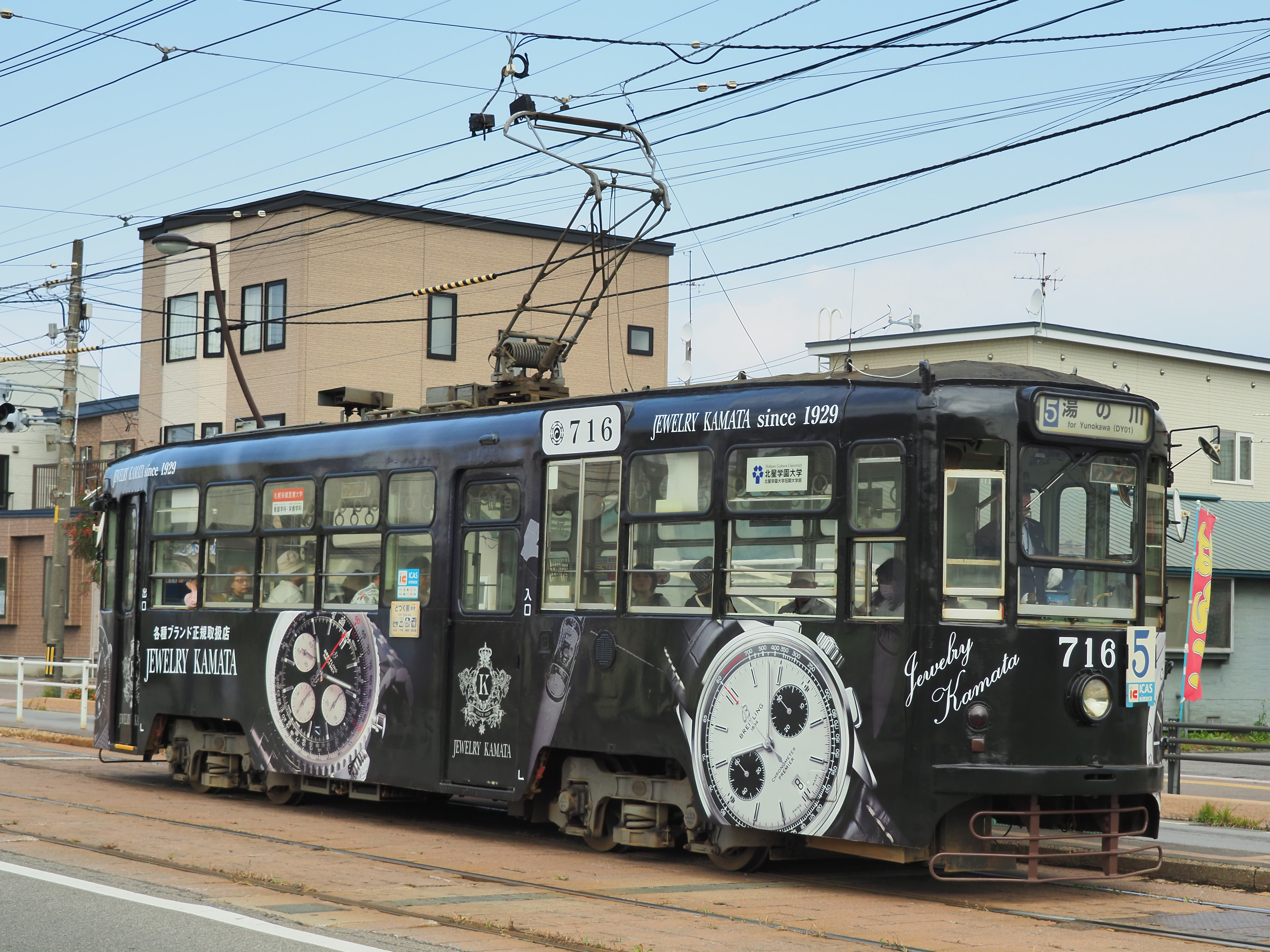 函館市電716号。2019年9月30日撮影。